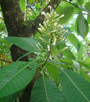 Creative Commons Attribution 2.0 (CC BY 2.0) Some rights reserved © Dick Culbert View source Supplier: Flickr: EOL Images Photographer: Dick Culbert Location Created: Limon, Costa Rica View full-size image